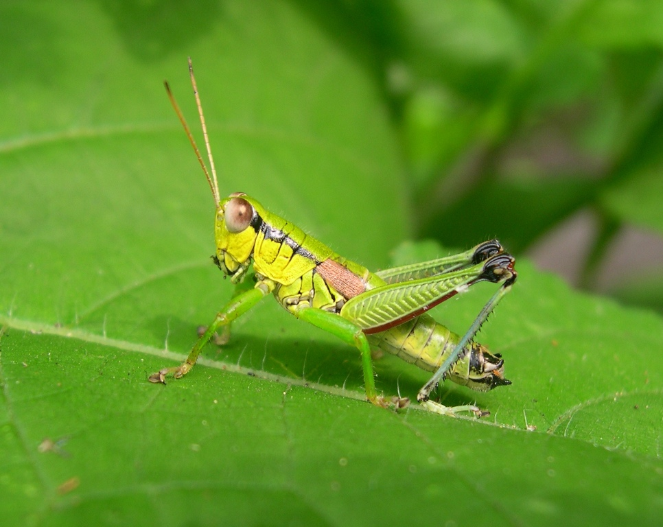 Parapodisma tanzawaensis Tominaga et Wada, 2001 (Orthoptera: Caelifera: Acrididae: Melanoplinae)--male adult . Loc: Yokohama, Kanagawa Pref., Honshu, Japan. タンザワフキバッタ（バッタ科フキバッタ亜科）の成虫・雄 神奈川県横浜市